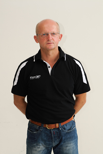 Jiří Ehrenberger; Krefeld Pinguine 2008/2009